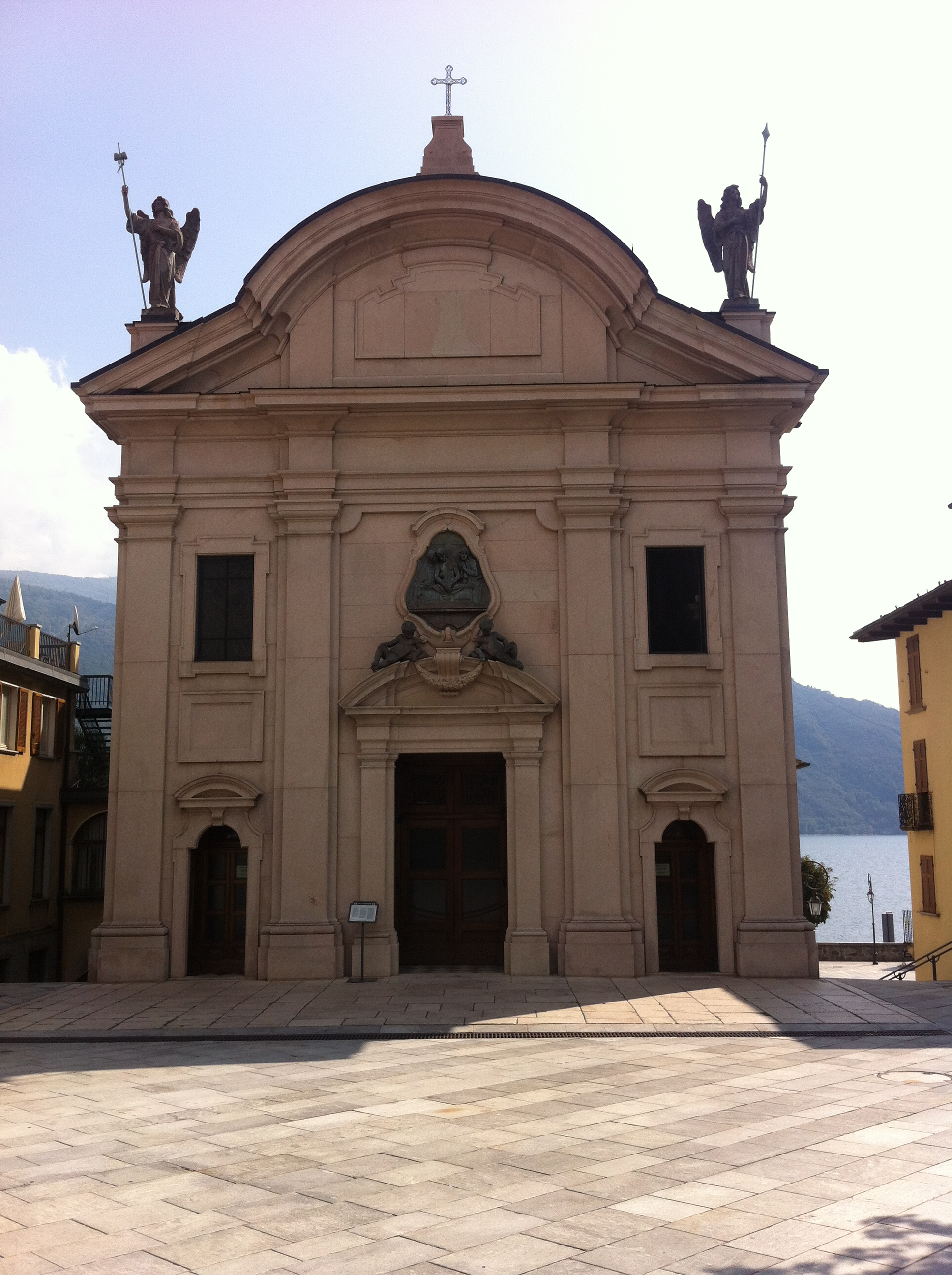 Wallfahrtskirche Santissima Pietà, Eingangsfassade